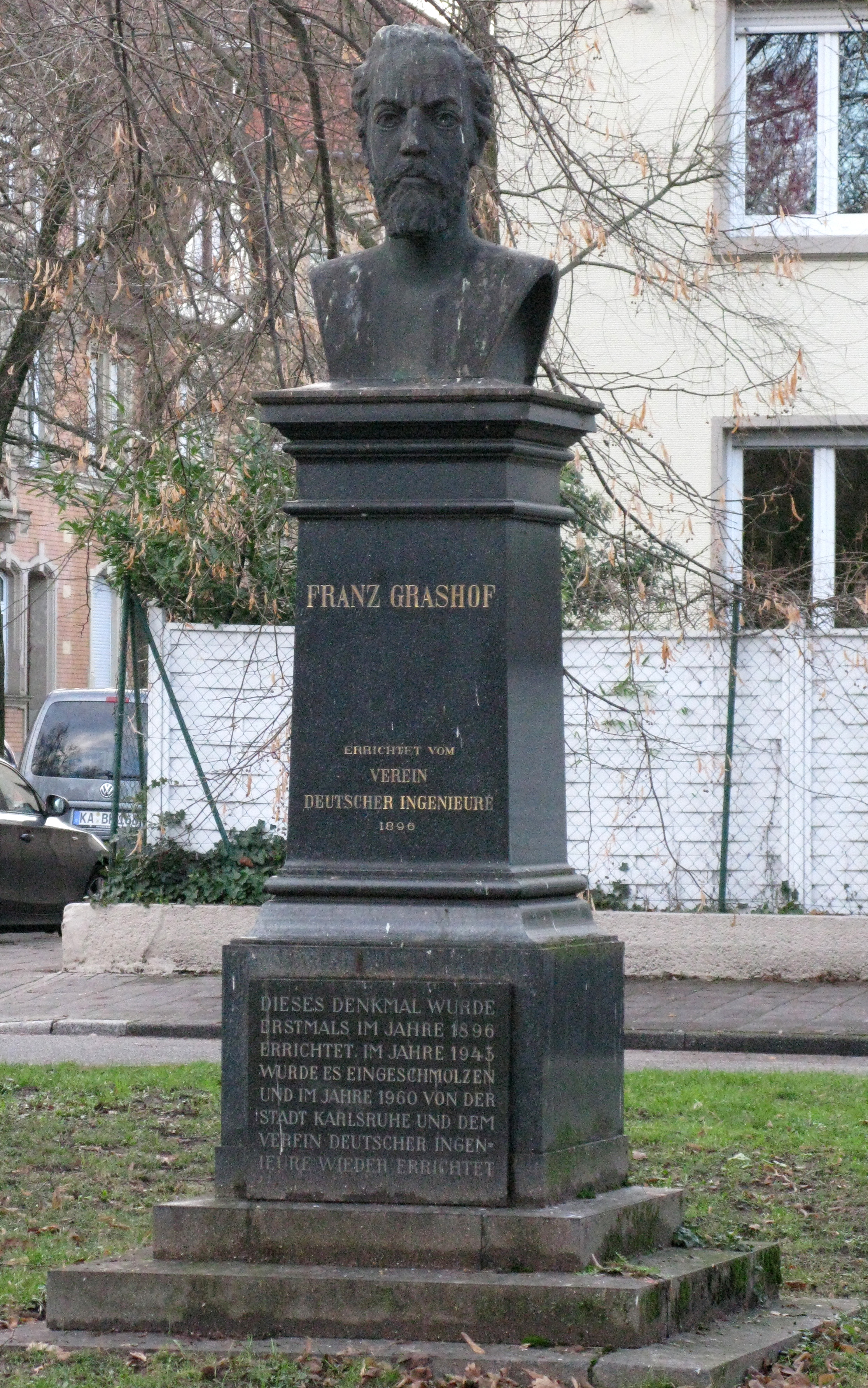 Denkmal für Franz Grashof von Karl Friedrich Moest auf der Beiertheimer Allee in Karlsruhe